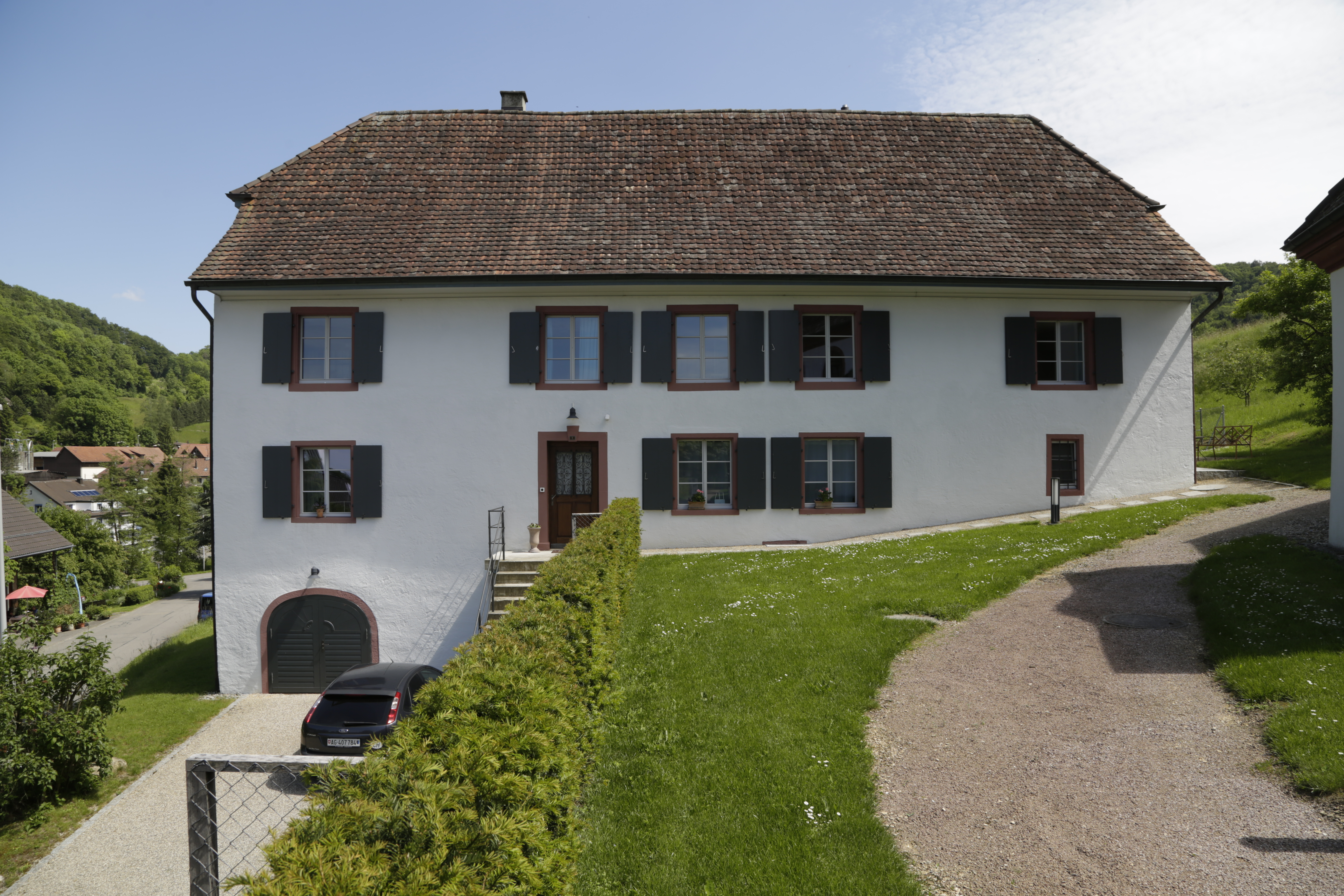 Das alte Pfarrhaus neben der christkatholischen Kirche in Obermupf.